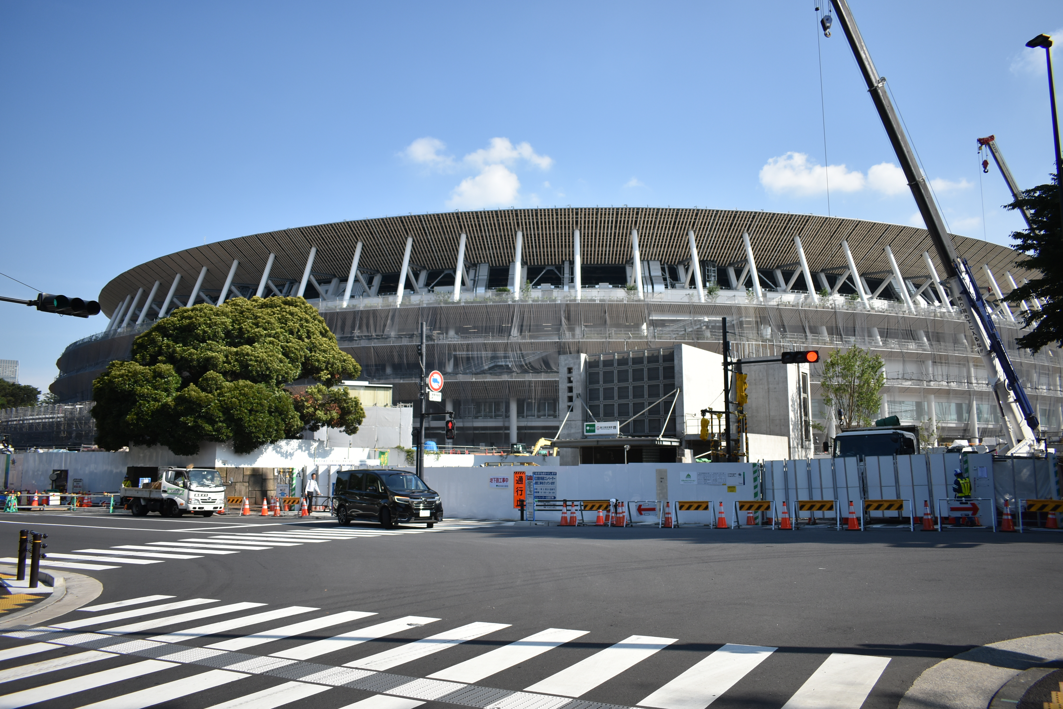 新国立競技場